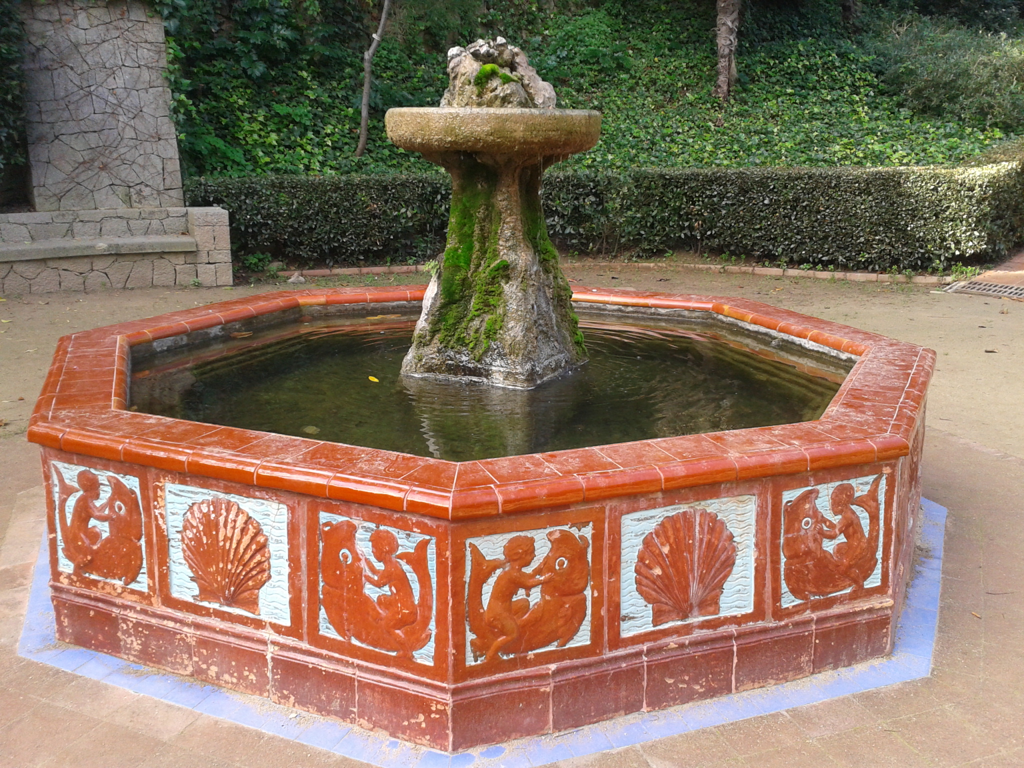 Font de Ceràmica als Jardins de Laribal. Ceràmica esmaltada amb motius marins, originàriament coronada amb un brollador en forma de peix.. Ceràmica esmaltada amb motius marins, originàriament coronada amb un brollador en forma de peix.